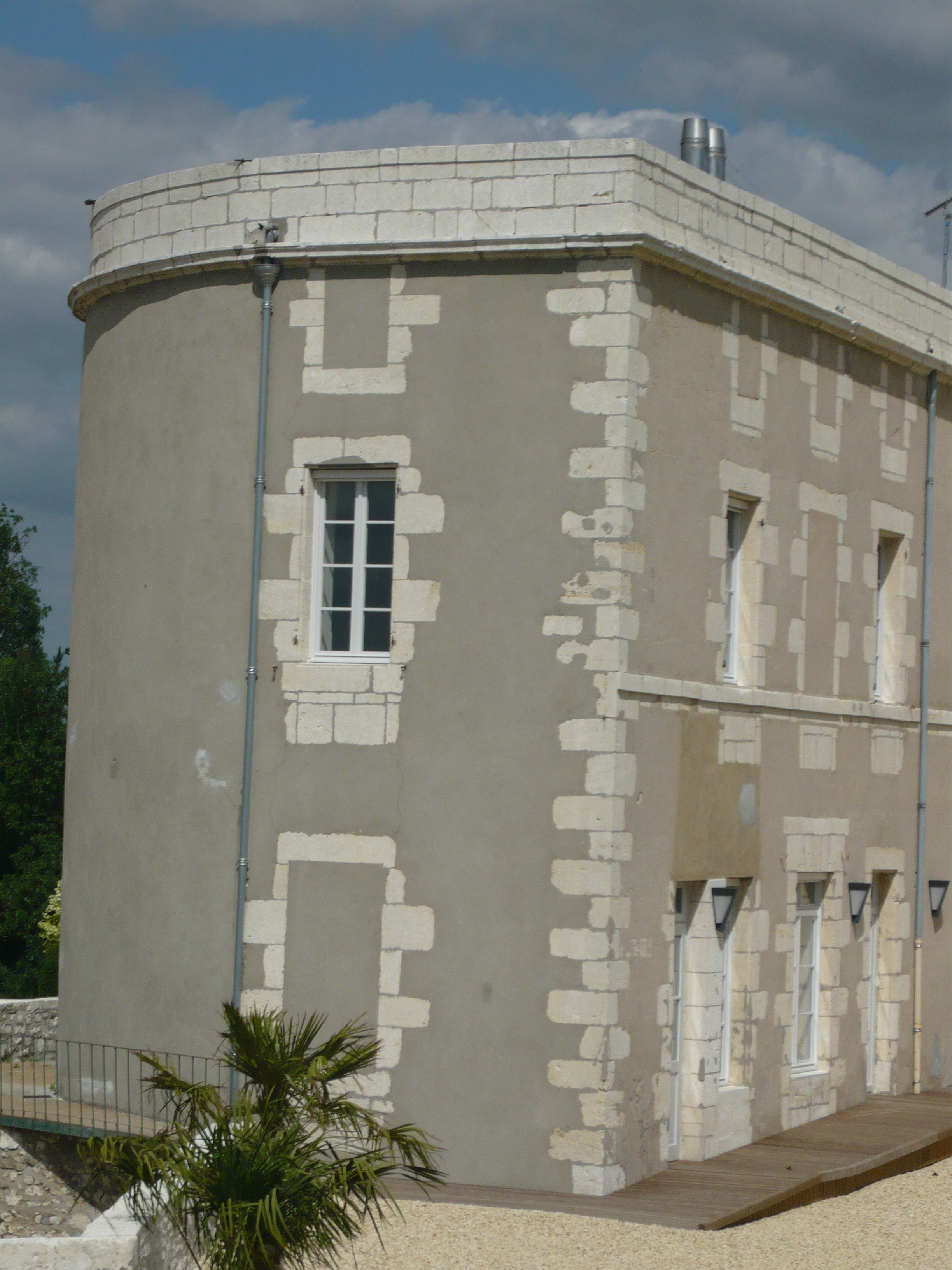 Vue sur la tour du château de Rochechouart de Tonnay-Charente.